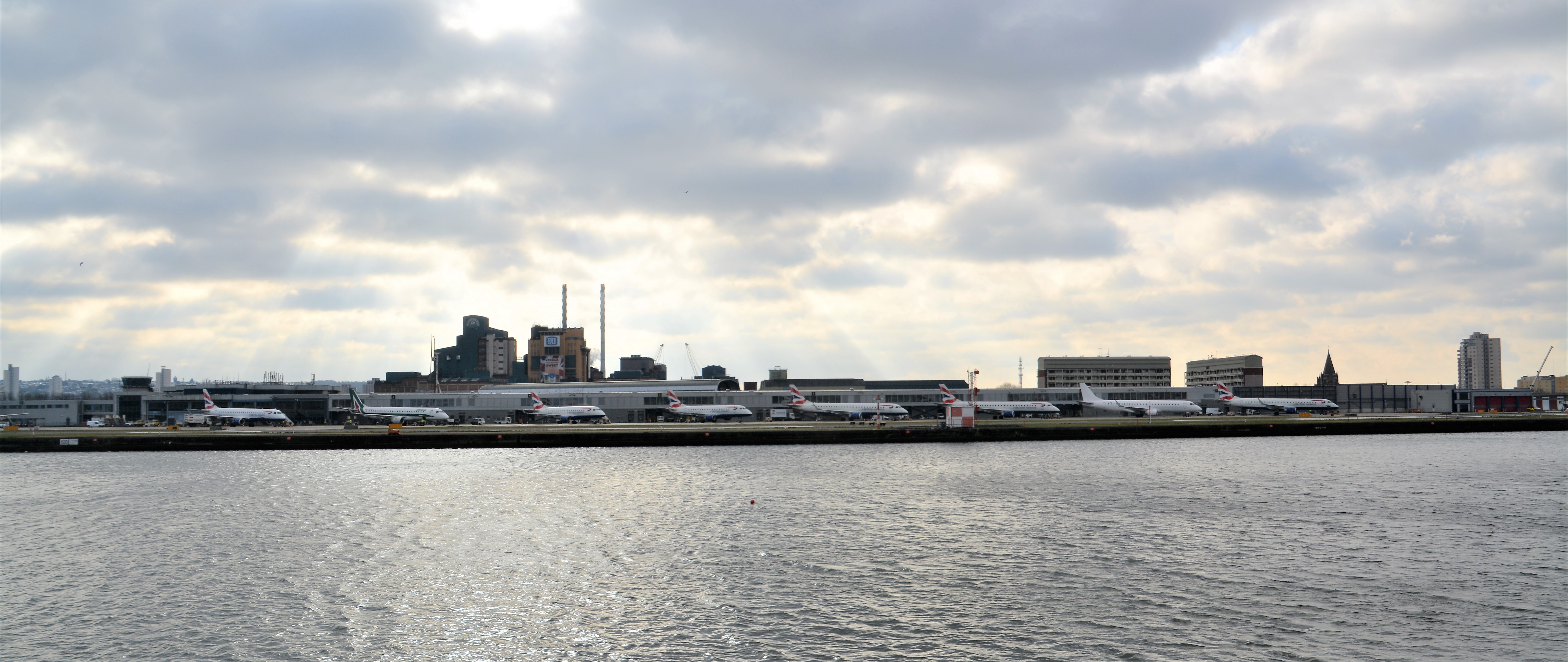 Ein Bild des Terminals und des Vorfeldes des London City Airports von der Gegenüberliegende Seite gesehen